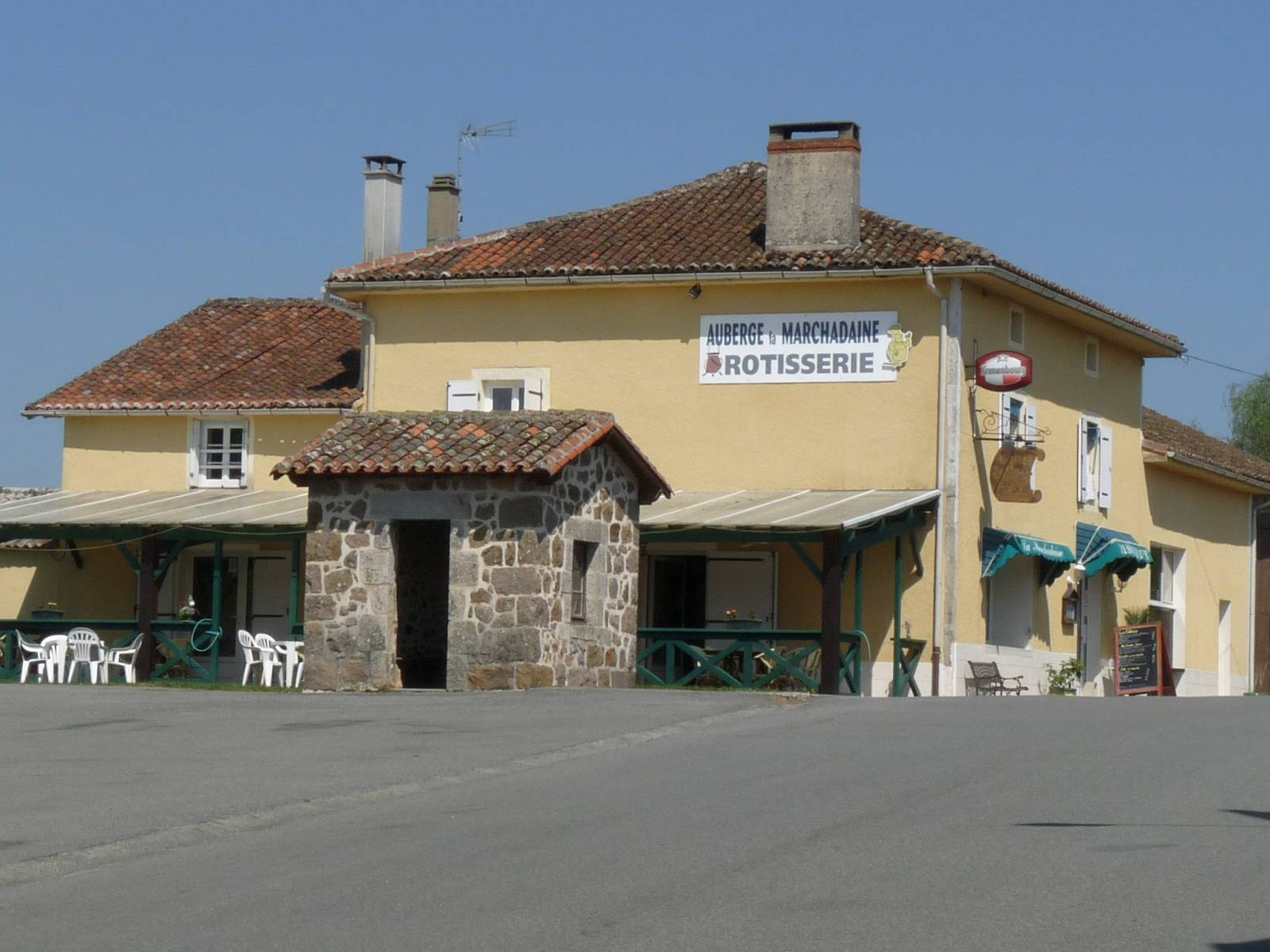 restaurant de Montrollet, Charente, France